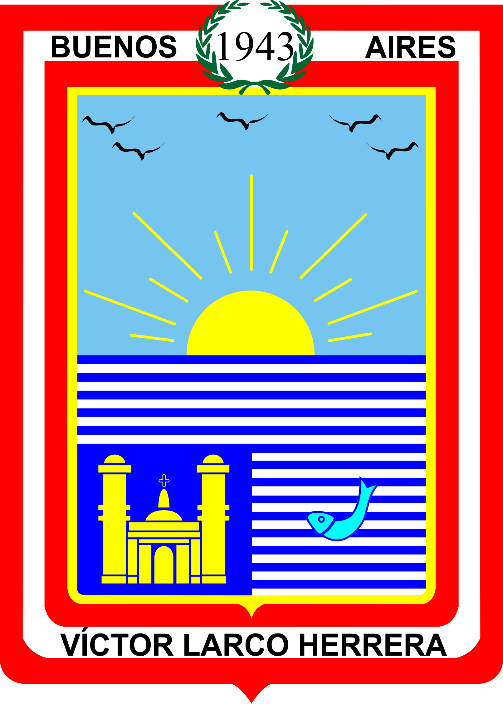 Escudo de la ciudad de Víctor Larco Herrera e isotipo municipal